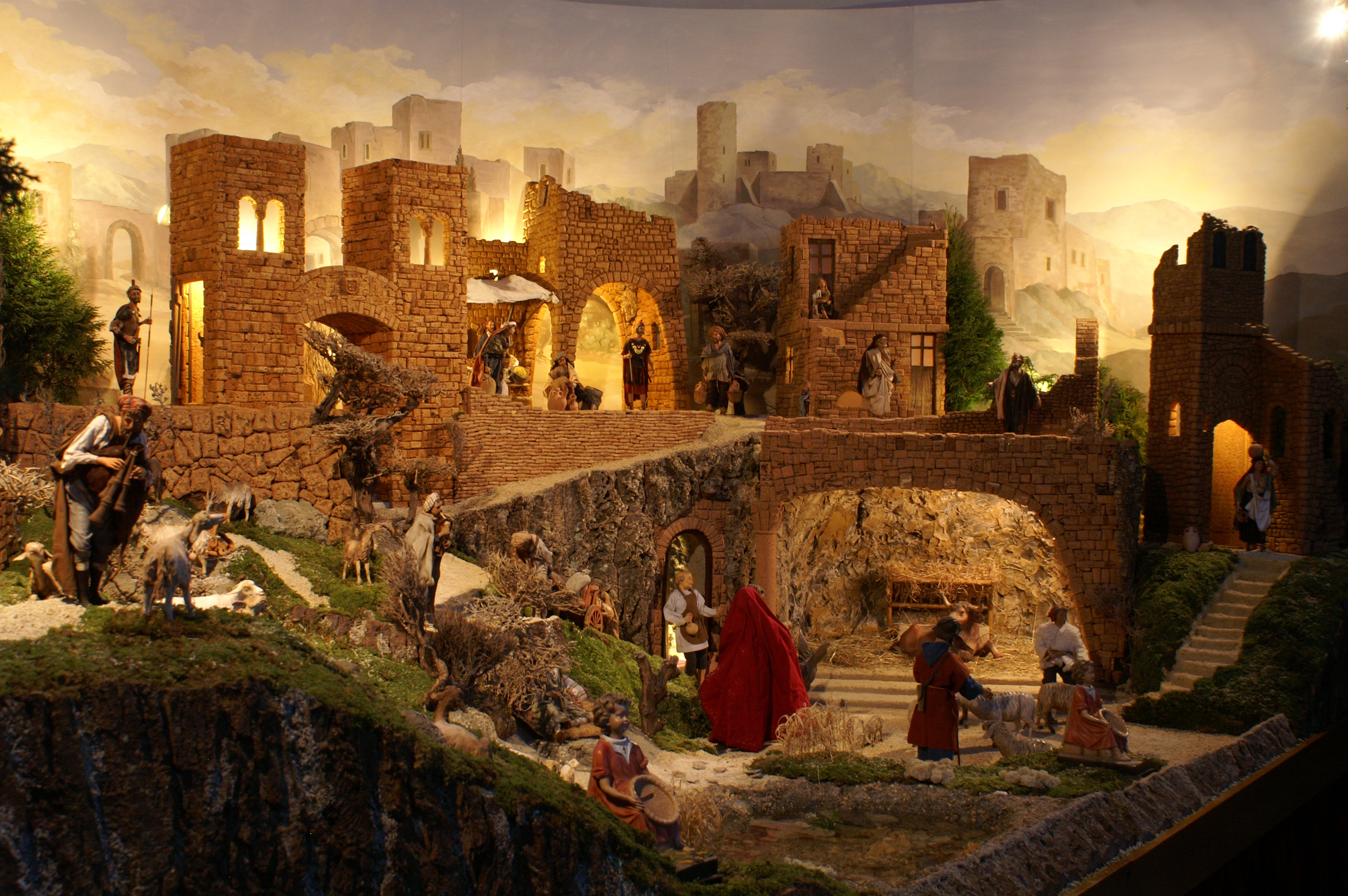 Jedes Jahr zur Weihnachtszeit wird in der Ave Maria eine prächtige Krippe aufgebaut